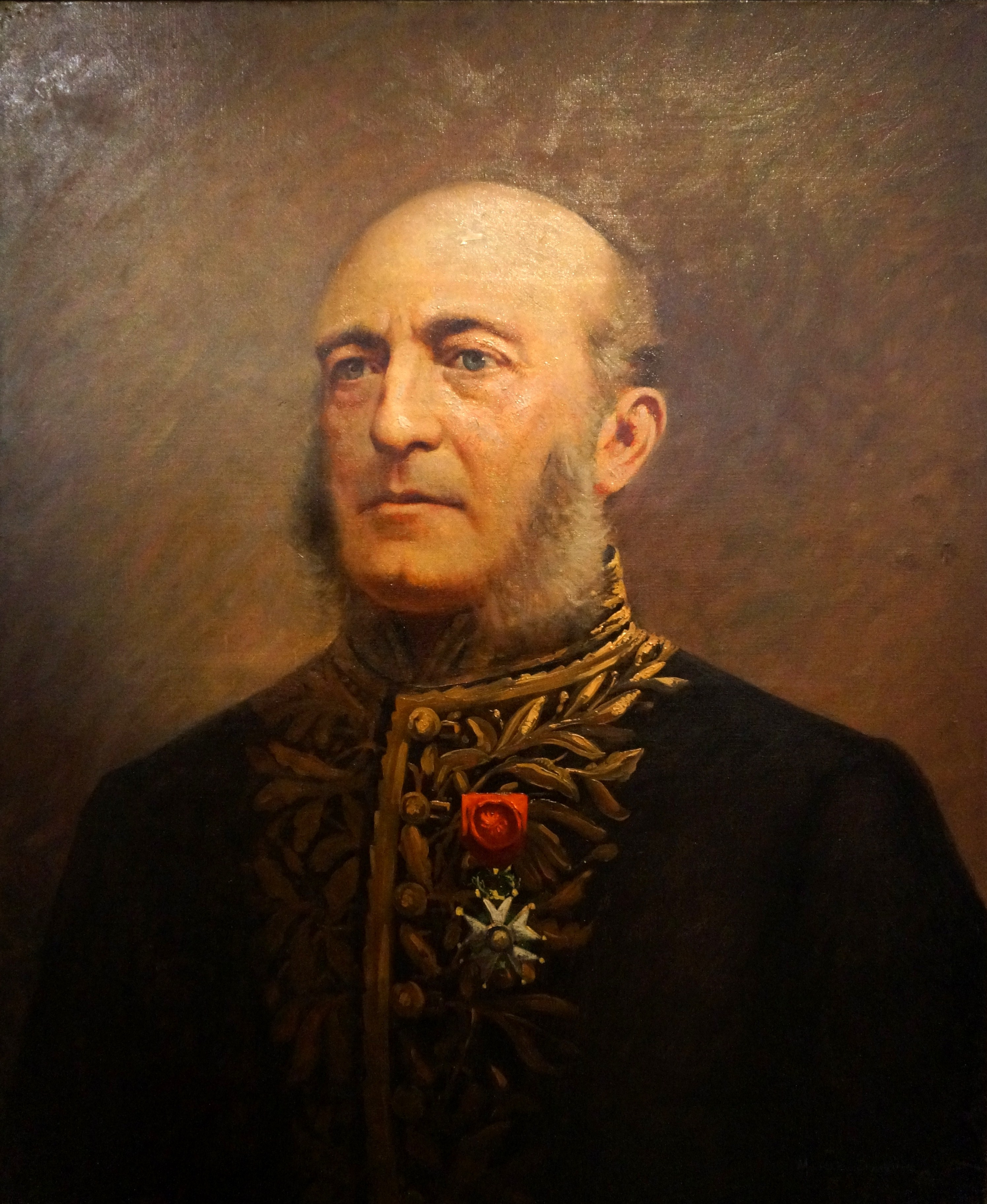 Pierre-Paul de La Grandière amiral, huile sur toile de Mascré souville, musée du quai branly.